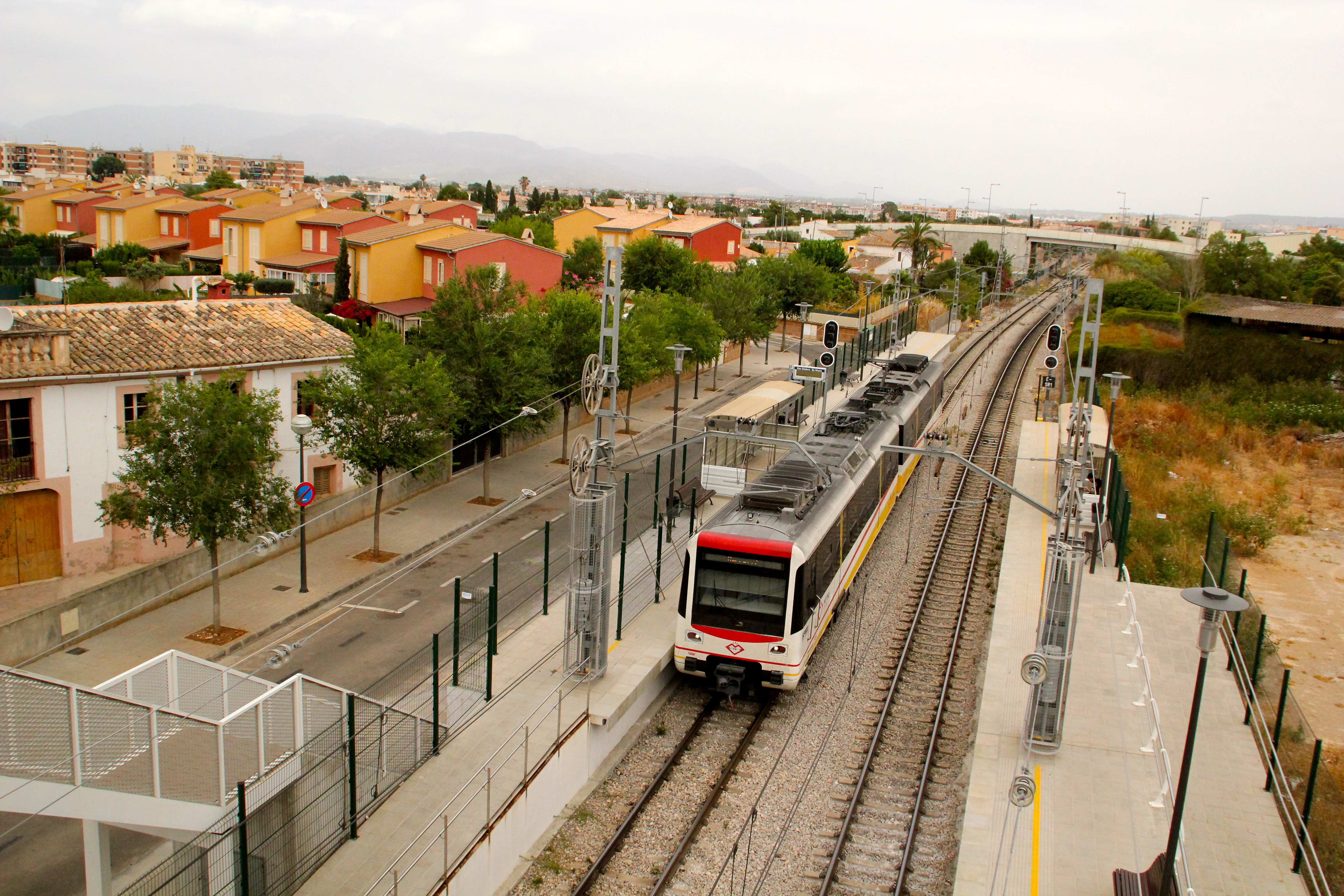 sortida convoi